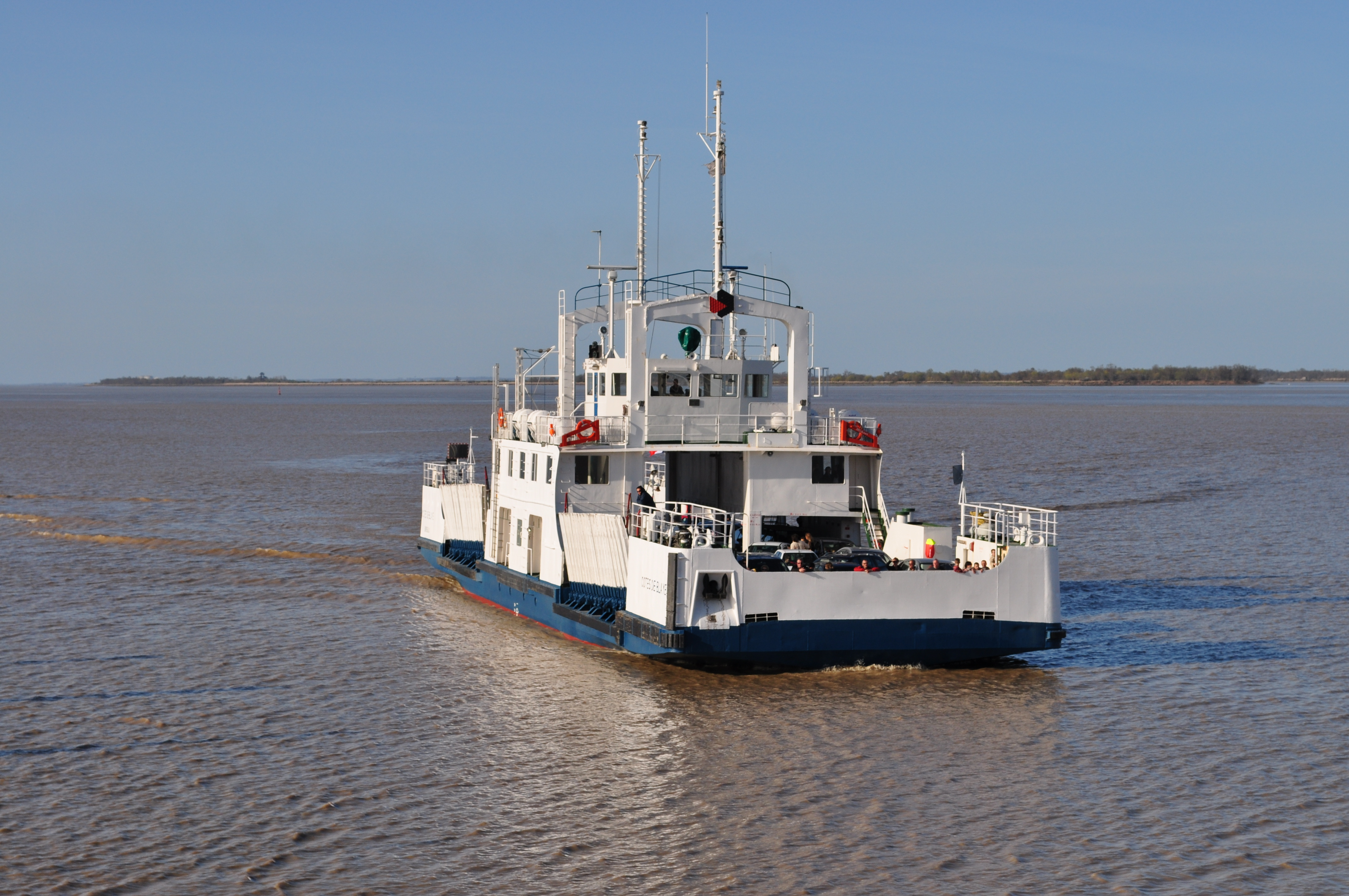 Bac "Côtes de Blaye" effectuant la liaison entre Blaye et Lamarque Photo prise le 5 avril 2009 sur l'embarcadère de Lamarque